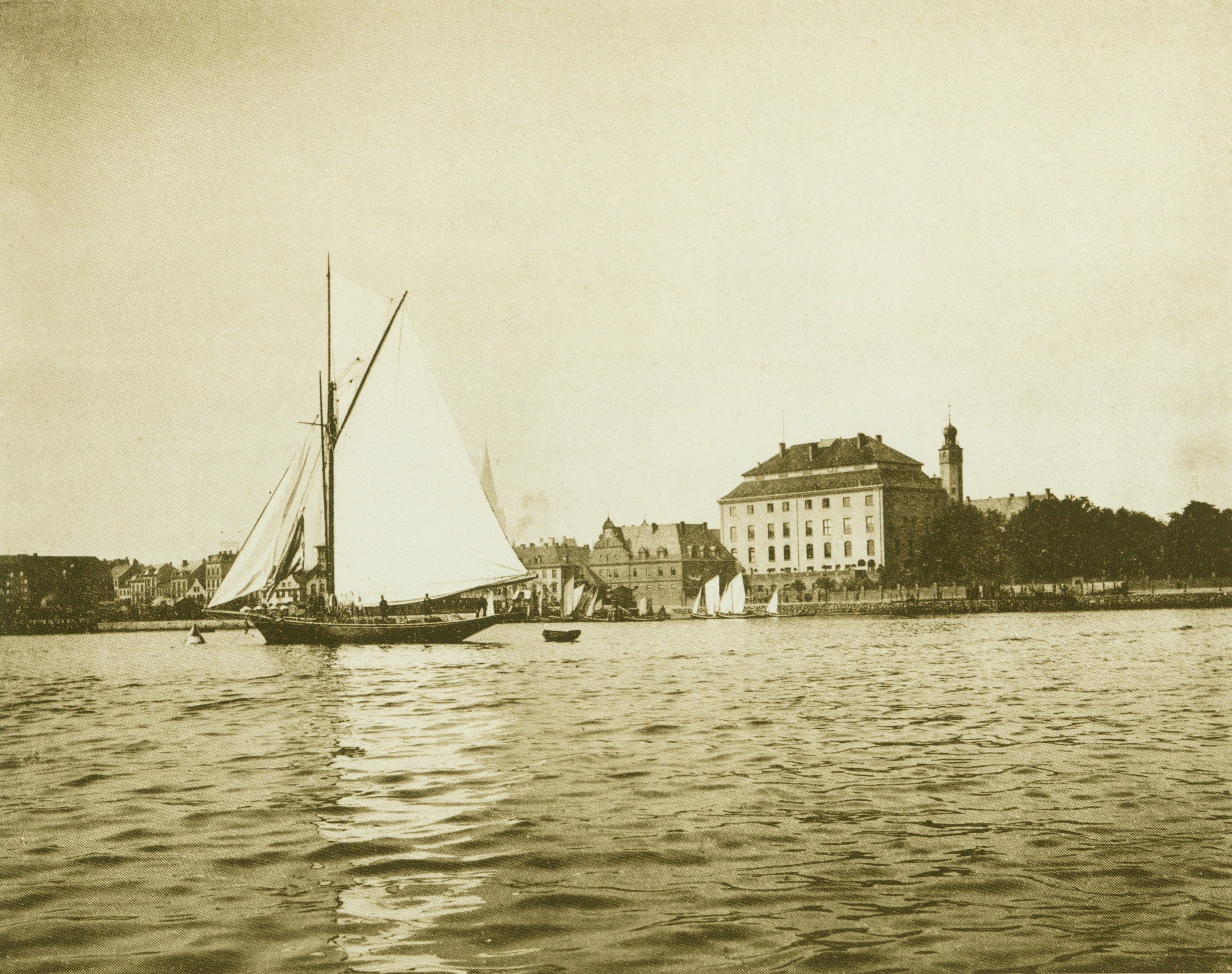 Kiel: Blick über die Kieler Förde auf den Ostflügel des Schlosses(1893)